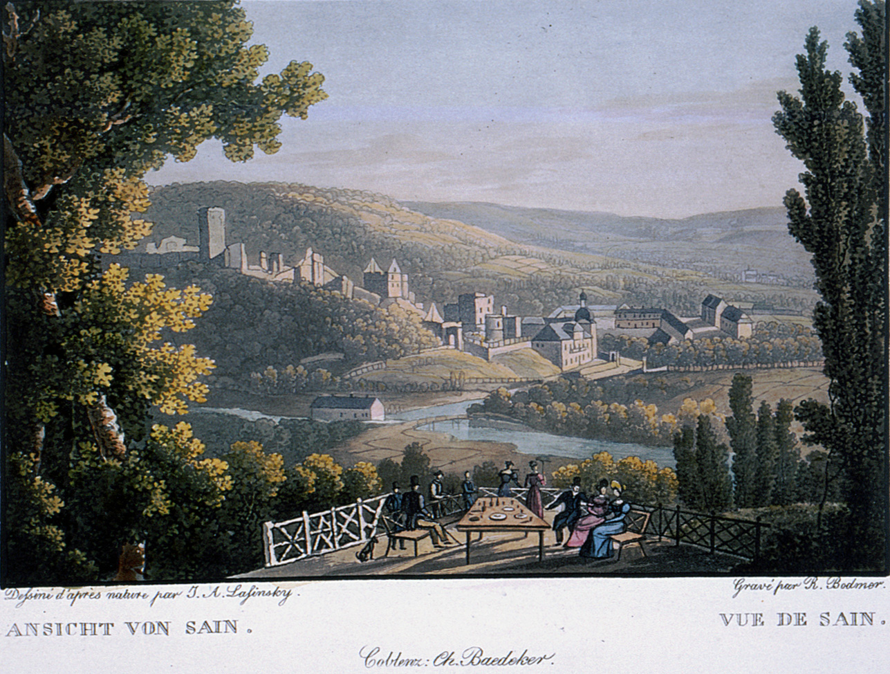 Altkolorierter Aquatintastich von R.Bodmer nach Vorlage von J.A.Lasinsky